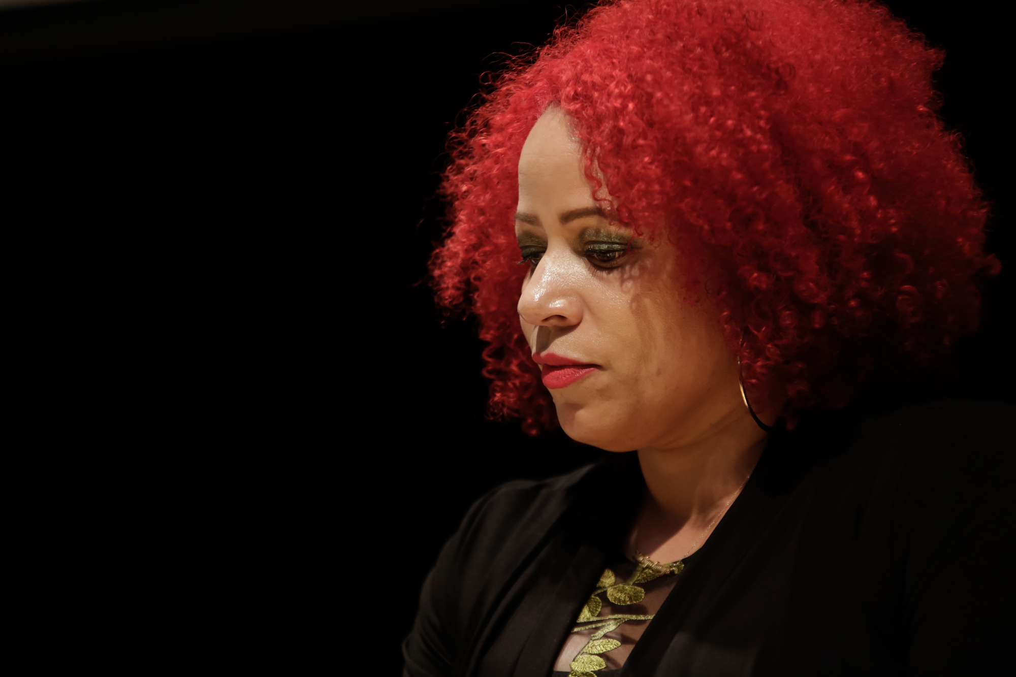 Cobrindo gênero e raça: o que podemos aprender com o NYTimes Palestrante: Nikole Hannah-Jones (The New York Times) Moderação: Marcelo Moreira (TV Globo/Abraji) Foto: Alice Vergueiro/Abraji